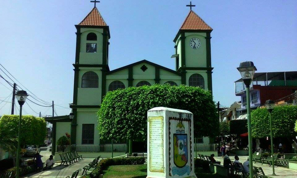 Iglesia de Playa Vicente